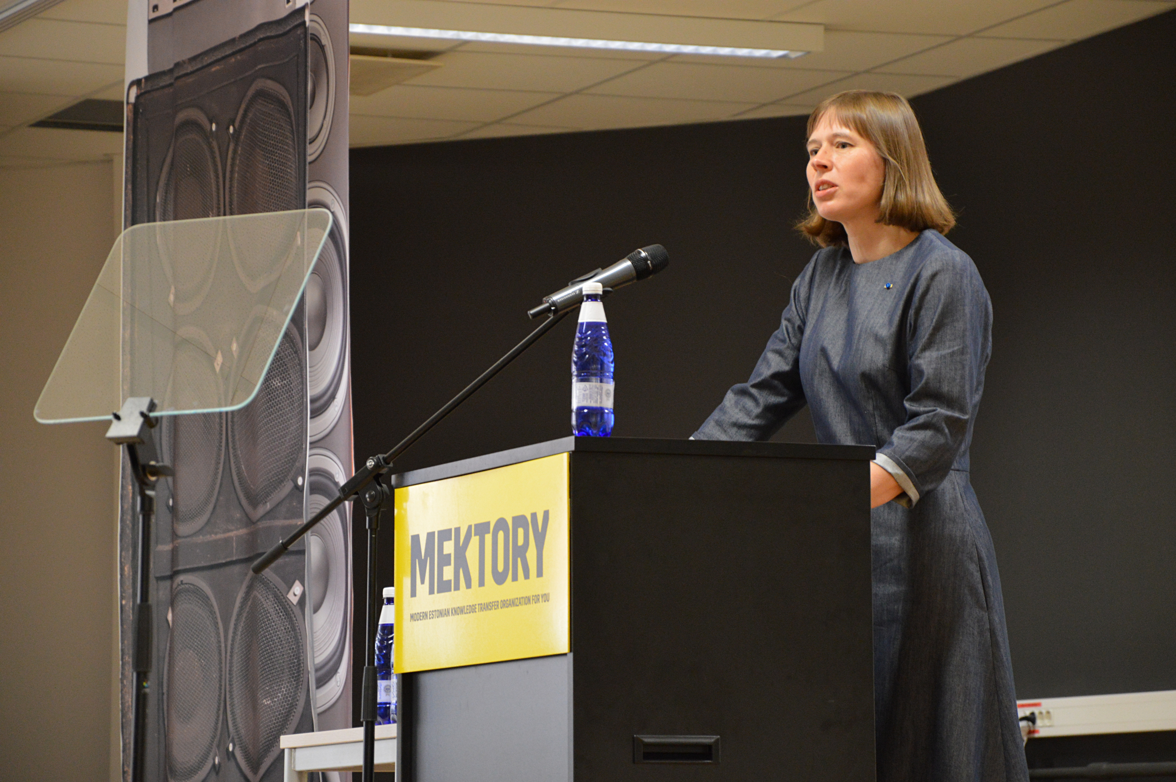 Kersti Kaljulaid kõnelemas 2017. aasta Euroopa füüsikaolümpiaadi lõpetamisel Tallinnas.